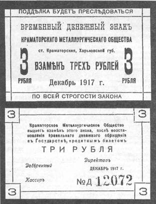 бони (тимчасові горошві знаки) Краматорського металургійного товариства